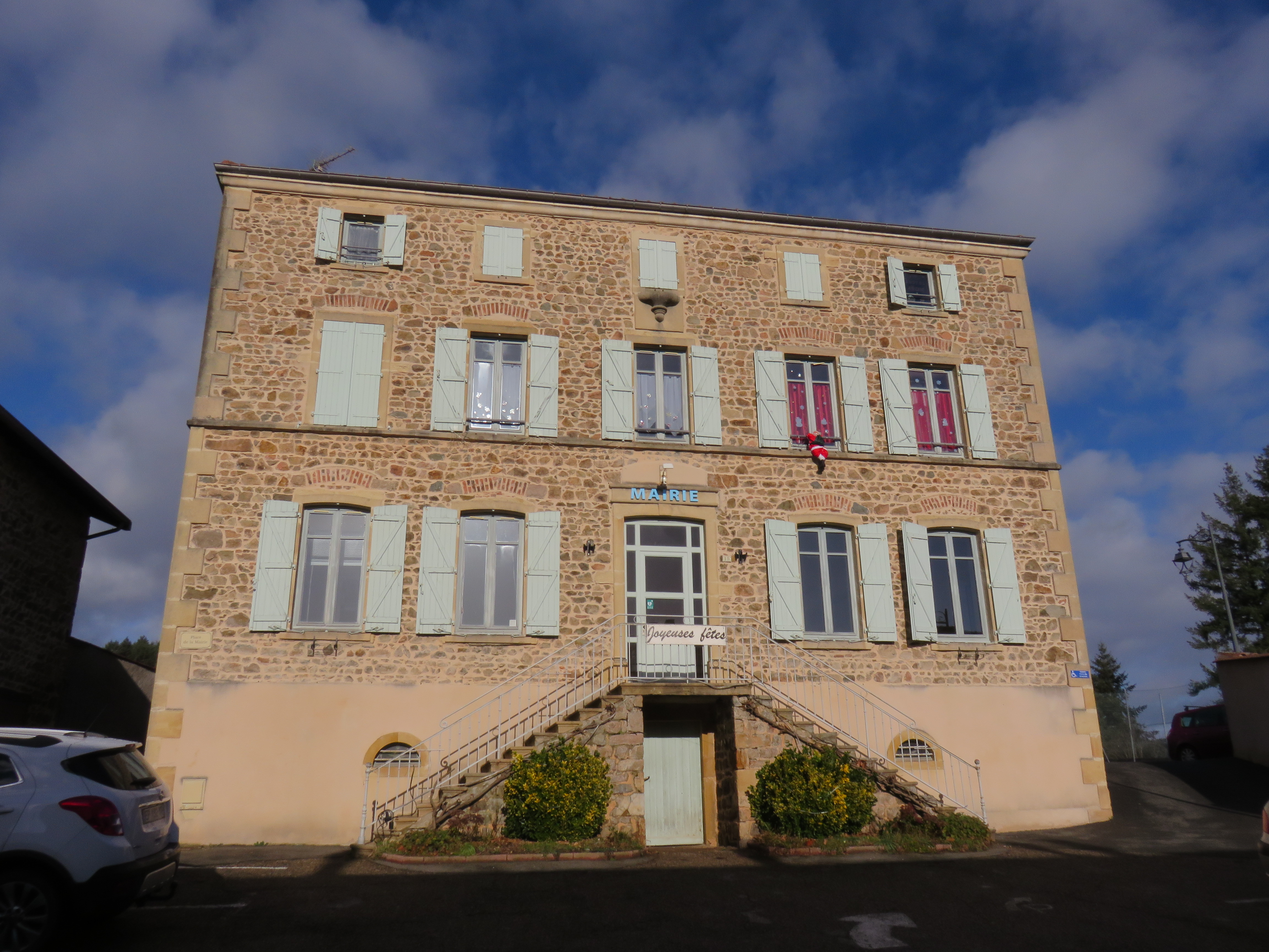 Mairie de Saint-Nizier-d'Azergues (Rhône, France).